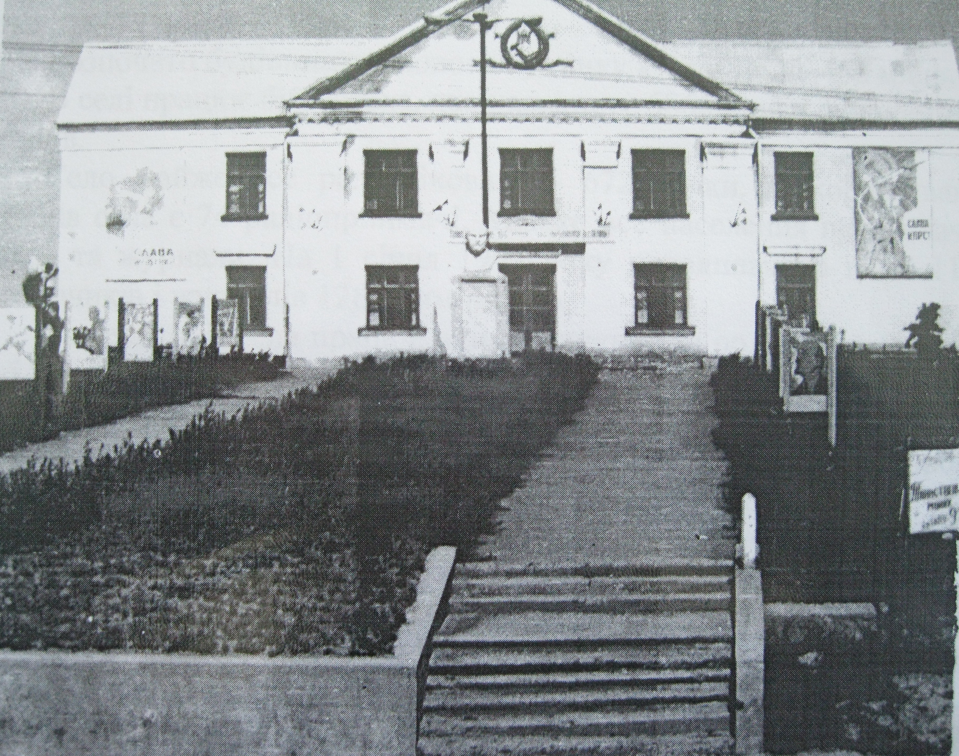 Новозбудований Сутковецький будинок культури, бібіліотека розташована на другому поверсі. Фото зроблене у 1967 р.